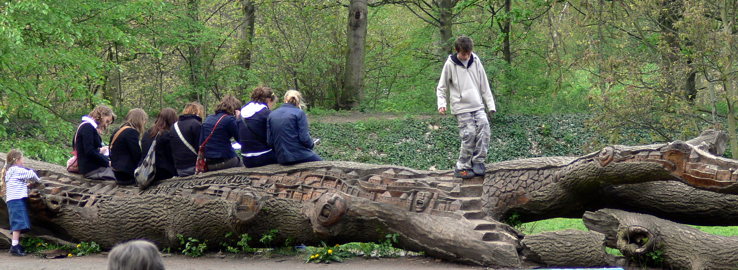 Le tronc d'un arbre coupé parce qu'il menaçait une zone très passante (accès au zoo de Lille, à proximité d'une aire de jeux pour enfants, d'un chemin de promenade et d'un petit centre de restauration), a été conservé et sculpté par un artiste. Ces collégiennes anglaises ont préféré s'asseoir sur cette sculpture, plutôt qu'utiliser les nombreux bancs installés à proximité. Ce tronc est également très apprécié des jeunes enfants. Lieu : Parc de la citadelle à lille (nord de la France). C'est en 2003 que Christophe Cardon (Craken) a réalisé cette sculpture. Il est de nouveau présent au parc depuis le 27 avril pour continuer de sculpter le tronc et y créer un immense château fort où les enfants pourront jouer à loisir. Pendant 7 mois, les enfants ont interdiction de marcher sur la zone récemment sculptée. Cette interdiction a plusieurs raison d'être. La zone sculpté, blanche et non vernie, est dangereuse. Les enfants peuvent s'y blesser facilement. C'est également une zone fragile qui peut facilement casser. Pour finir, l'interdiction permet aussi de garder le bois propre, de ne pas le recouvrir de terre et de cailloux que le sculpteur devrait retirer avant de travailler.